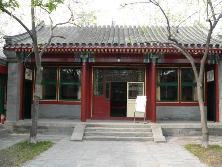 梅兰芳故居正房，2005年4月16日用心阁拍摄于梅兰芳纪念馆。